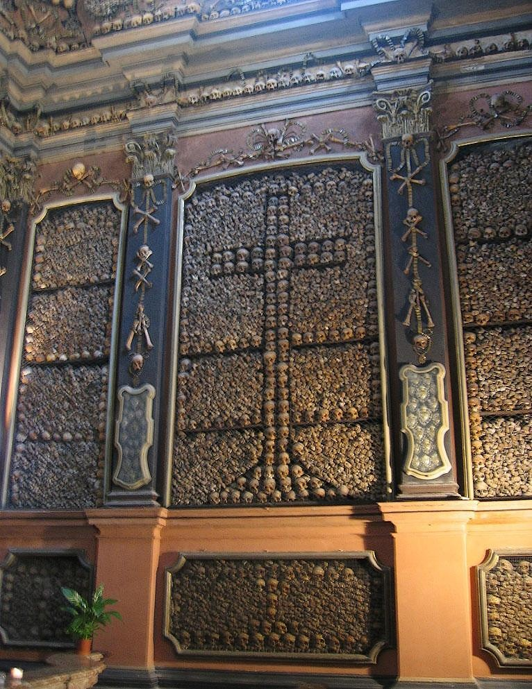 L'ossario barocco di San Bernardino alle ossa a Milano utilizza le ossa umane come elementi decorativi, e come "memento mori" di gusto controriformistico.